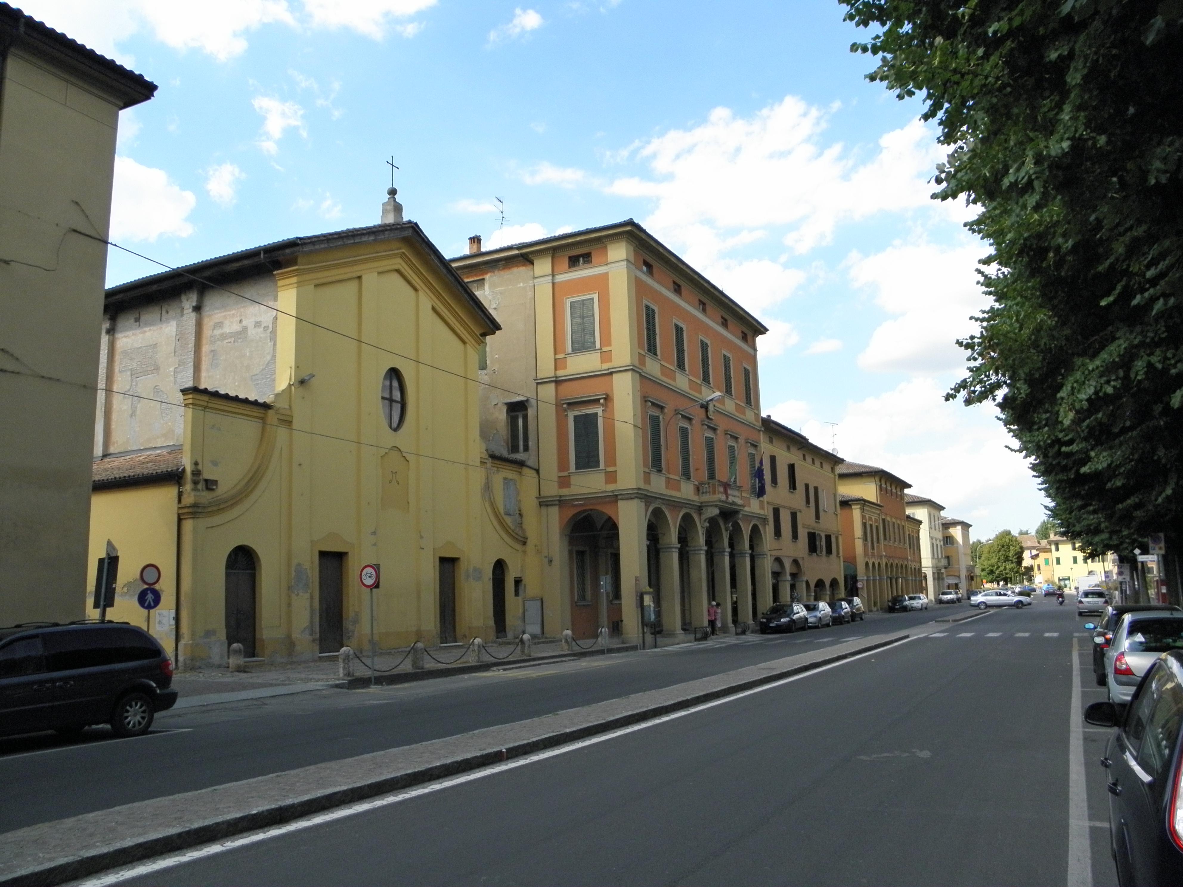 MInerbio, Via Giuseppe Garibaldi: vista dell'arteria principale del paese con l'Oratorio della Natività ed il Palazzo Municipale.